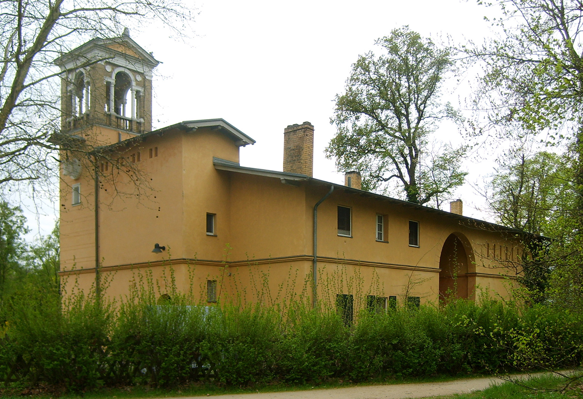 Der Kuh- und Wirtschaftspferdestall vom Drive aus gesehen